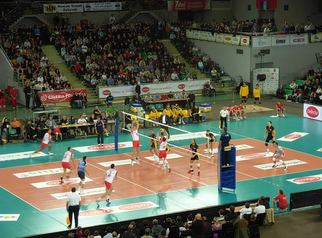 Hala Łuczniczka w Bydgoszczy. Mecz ligowy siatkówki mężczyzn Delecta (Chemik) Bydgoszcz - Skra Bełchatów.